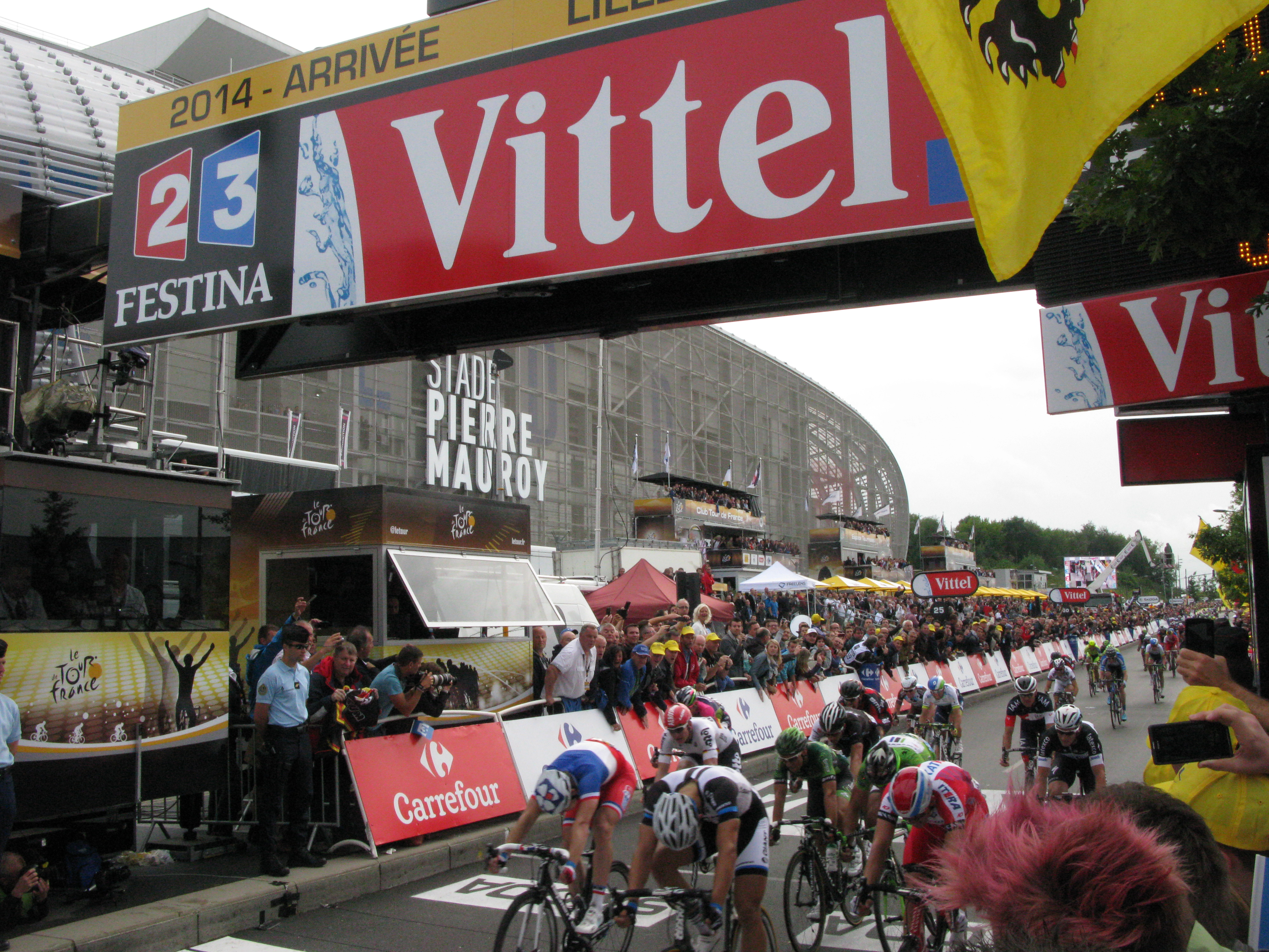 De g. à d., au 1er rang, Arnaud Demare, Marcel Kittel, Alexander Kristoff. Au 2e rang, André Greipel, Bryan Coquard, Peter Sagan. Au 3e rang, Davide Cimolai, Danny Van Poppel, Mark Renshaw. Au 4e rang, Heinrich Haussler, Samuel Dumoulin, Michael Albasini, Daniel Oss. Arrivée de la 4e étape du Tour de France 2014 à Villeneuve-d'Ascq.